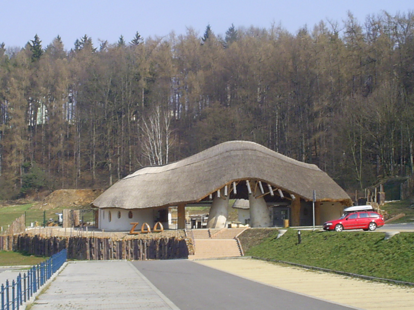 Jihlava's Zoo (Jihlava-Czech Republic).